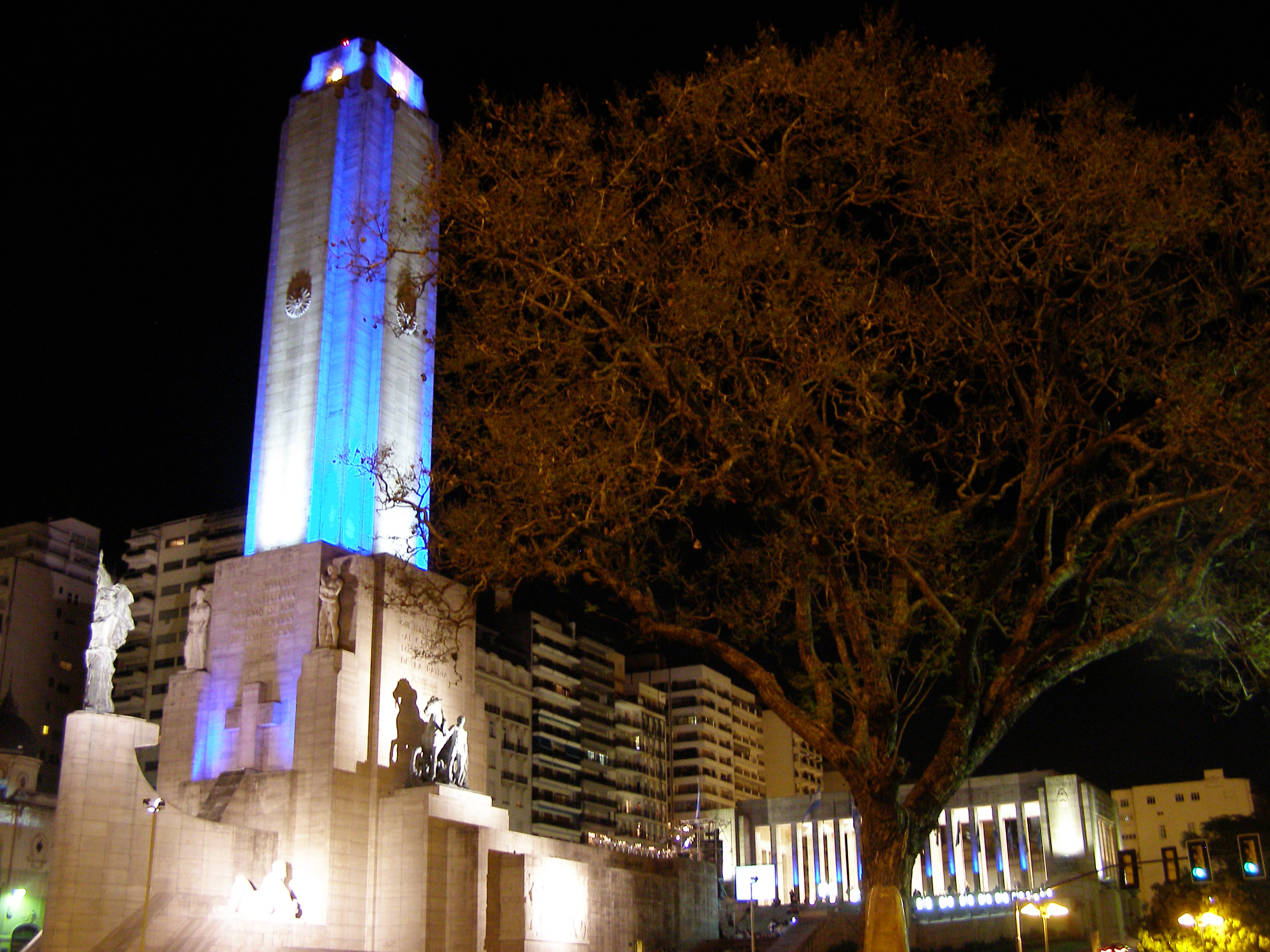 Monumento Nacional a la Bandera